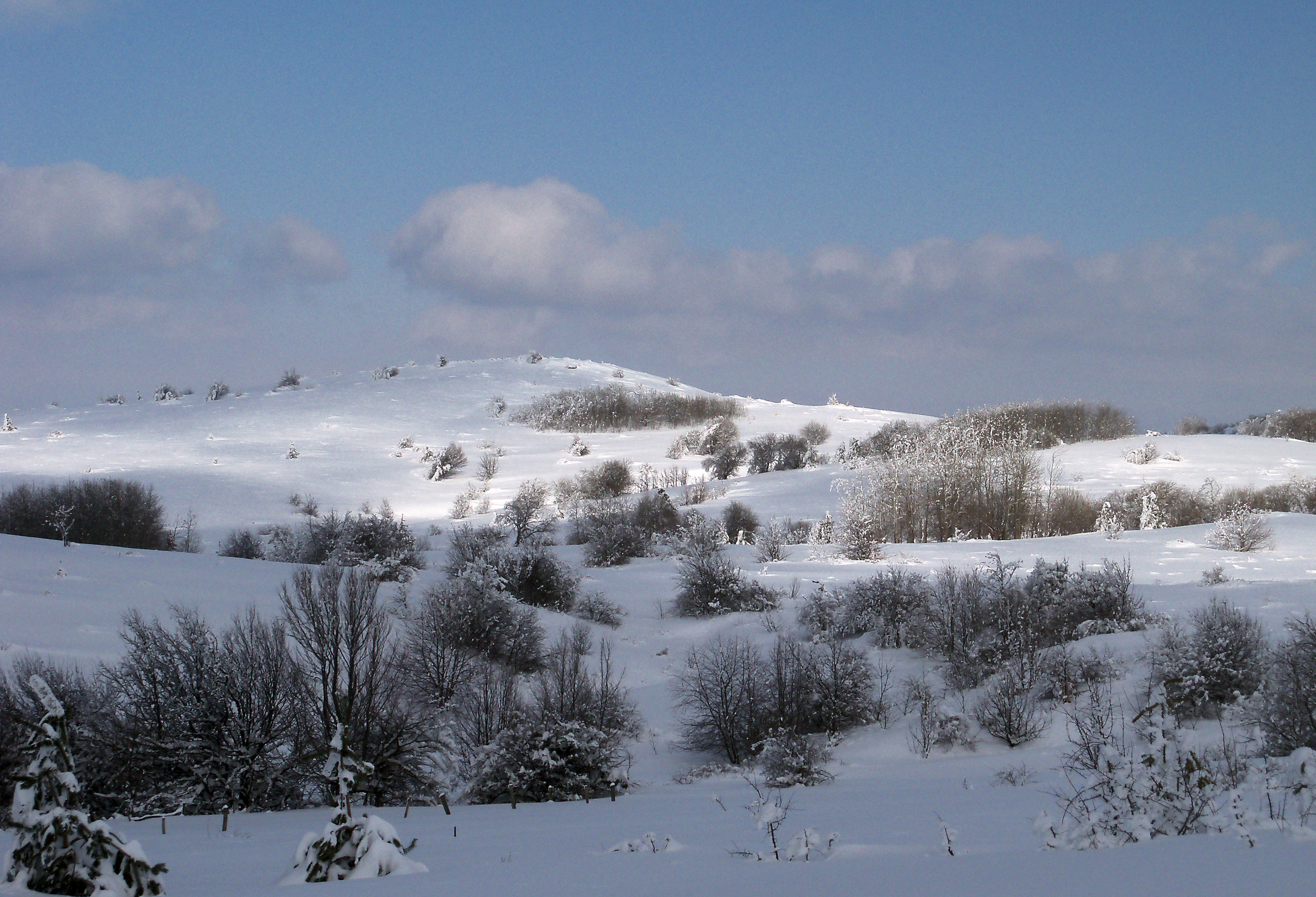 Фото